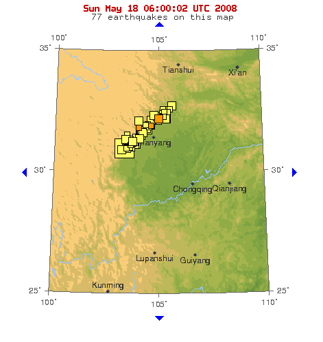 USGS map at 30°N,105°E